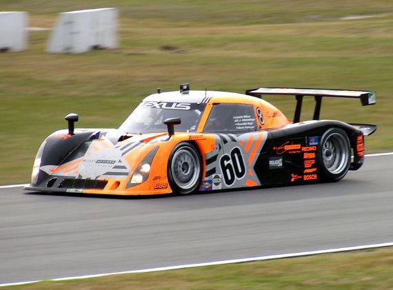 Lexus Daytona